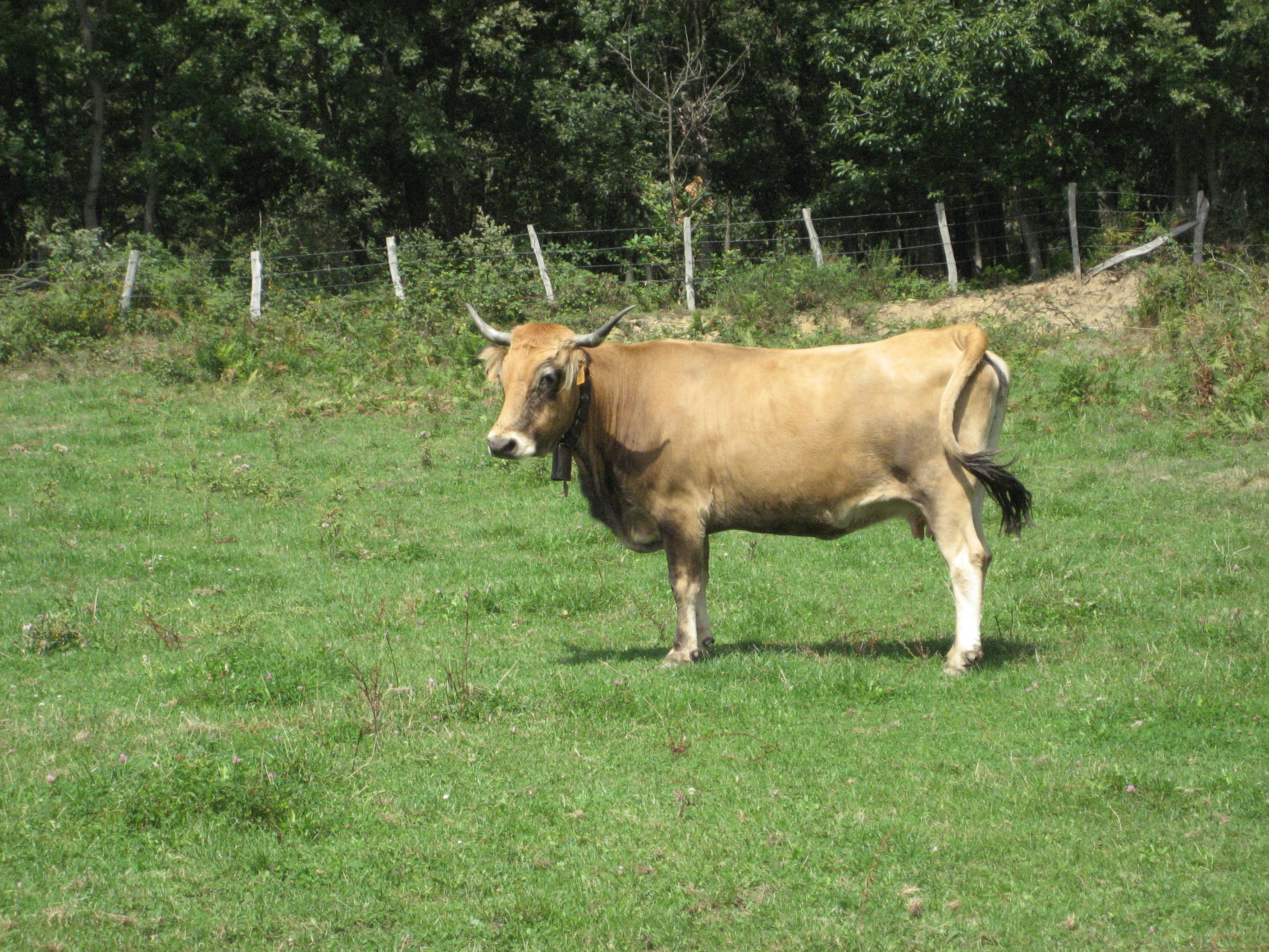 Vaca monchina.